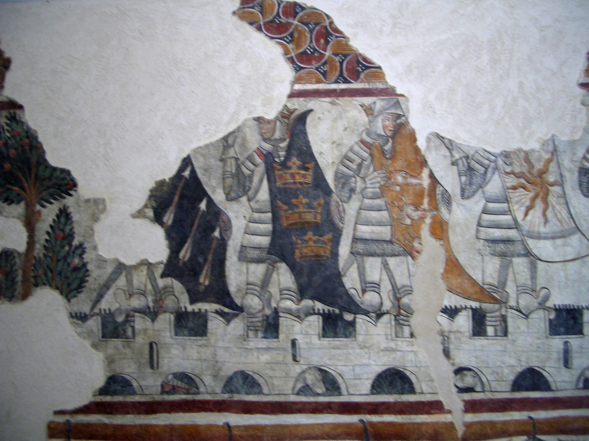 Giacomino di Ivrea, Nine Worthies, fresco removed from the castle of Villa Castelnuovo, ca. 1440-45, Cuorgnè, Museo Archeologico del Canavese